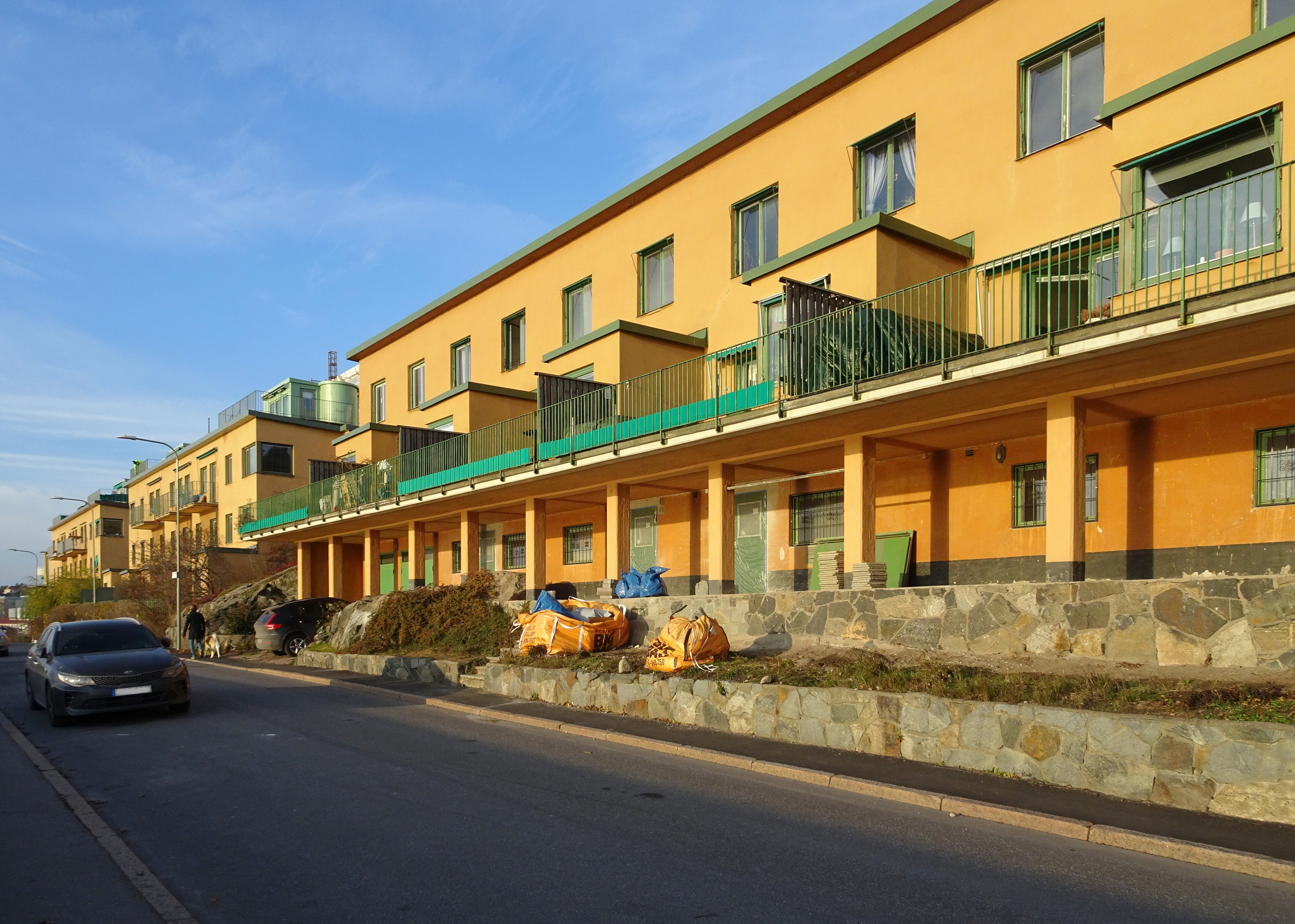 Kvarteret Tomten, Fredhäll, arkitekt Herbert Kockum 1935